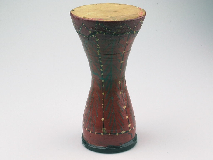 Het vel van deze bekertrom is op het tromlichaam van aardewerk gelijmd. Onder het vel zijn drie trilsnaren gespannen. Het tromlichaam is beschilderd met geometrische motieven. De onderkant van het tromlichaam is open.